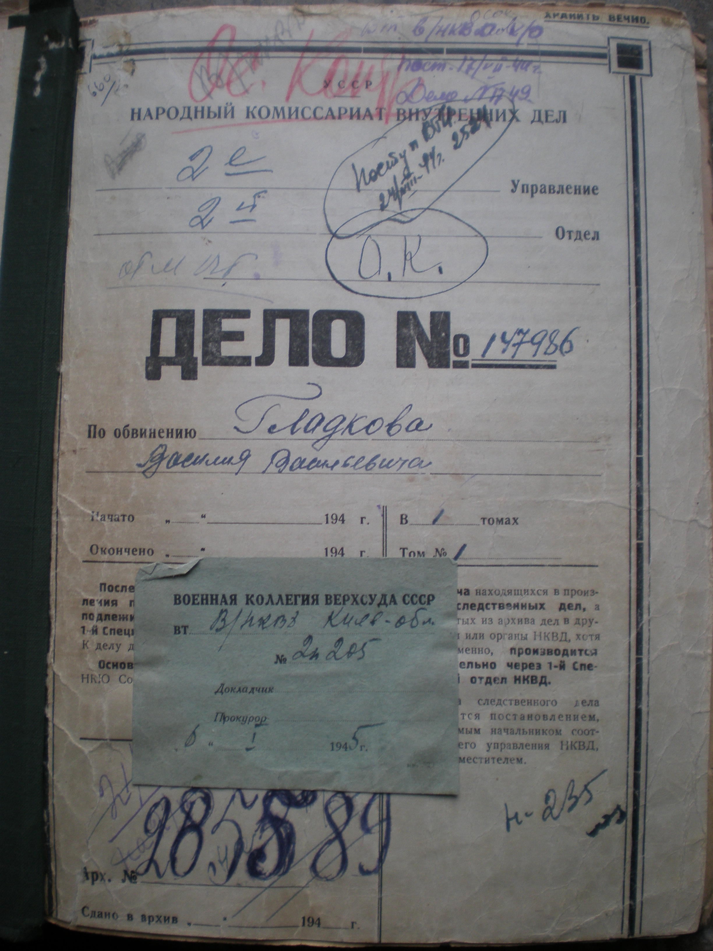 Титул архивного уголовного дела в отношении Гладкова Виктора Васильевича (1944)